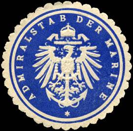 Sealing stamp Title: Admiralstab der Marine Description: blau, weiß, geprägt Place: size: 4 cm